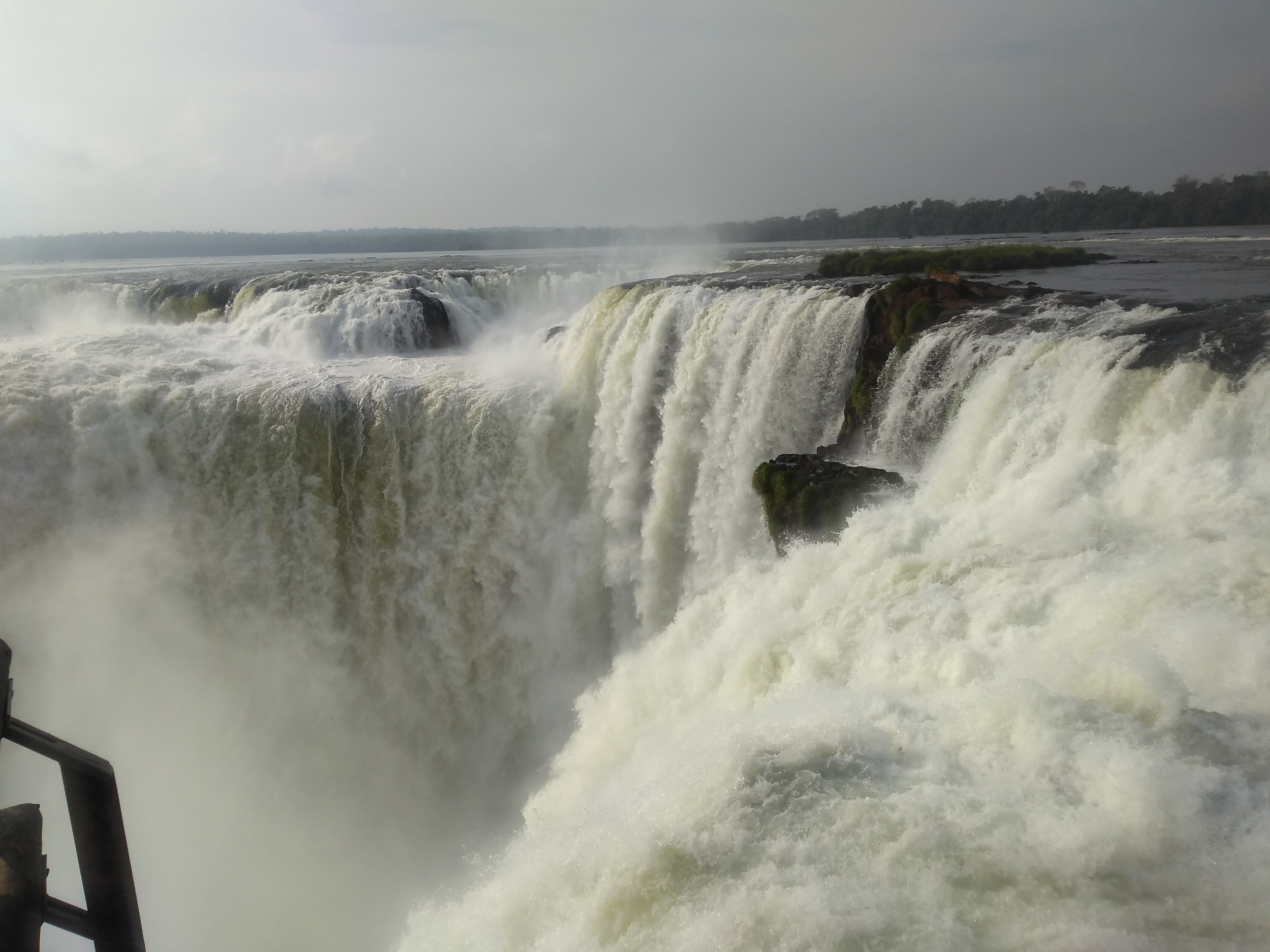 visita a Cataratas de Iguazu